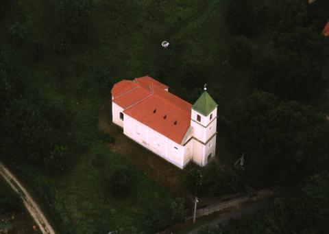 Vindornyalak, Hungary, aerialphotgraphy. Szentháromság római katolikus templom